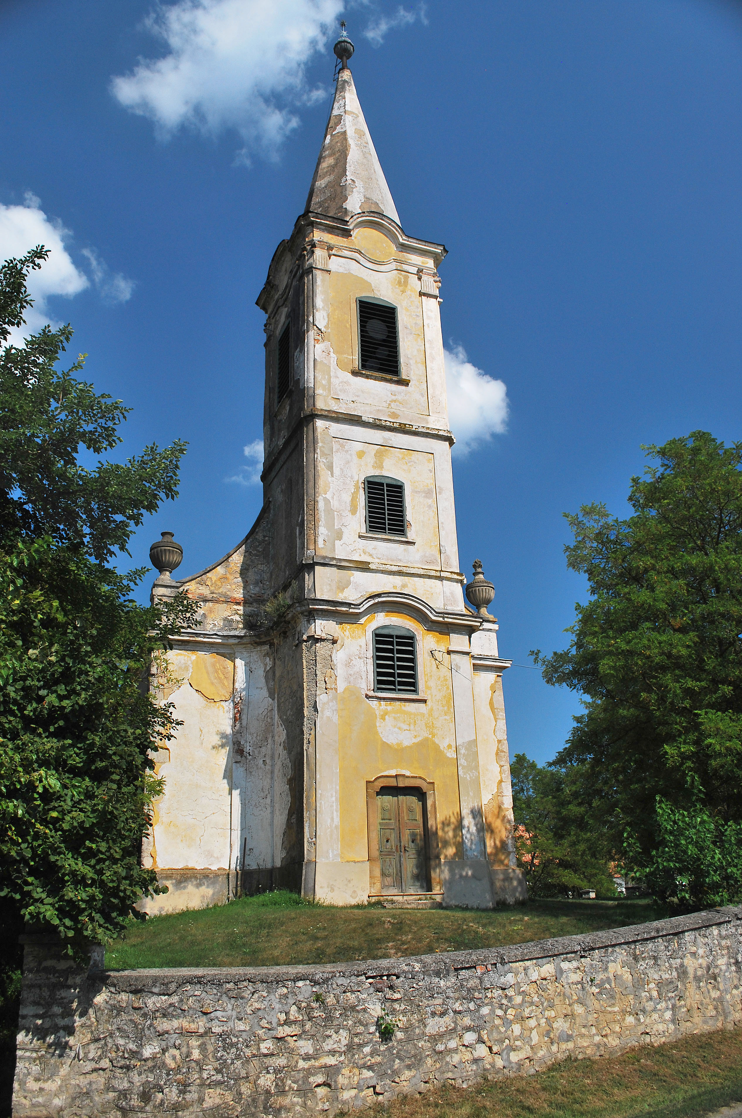 Monoszlói református templom tornya This is a photo of a monument in Hungary. Identifier: 10056